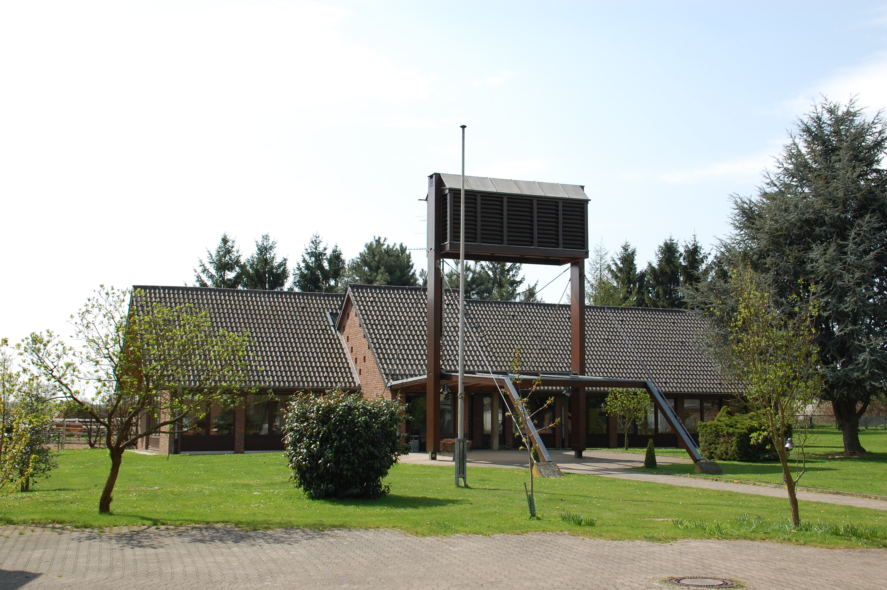 Apostel-Paulus-Kirche in Sindorf-Heppendorf, Kerpen, Germany